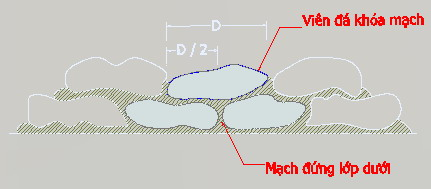 Hình do tôi tạo ra do vẽ trên phần mềm AutoCAD rồi chuyển sang dạng ảnh. Hình vẽ cách dùng viên đá khóa mạch vữa đứng của lớp xây dưới, xử lý trùng mạch khối xây đá.